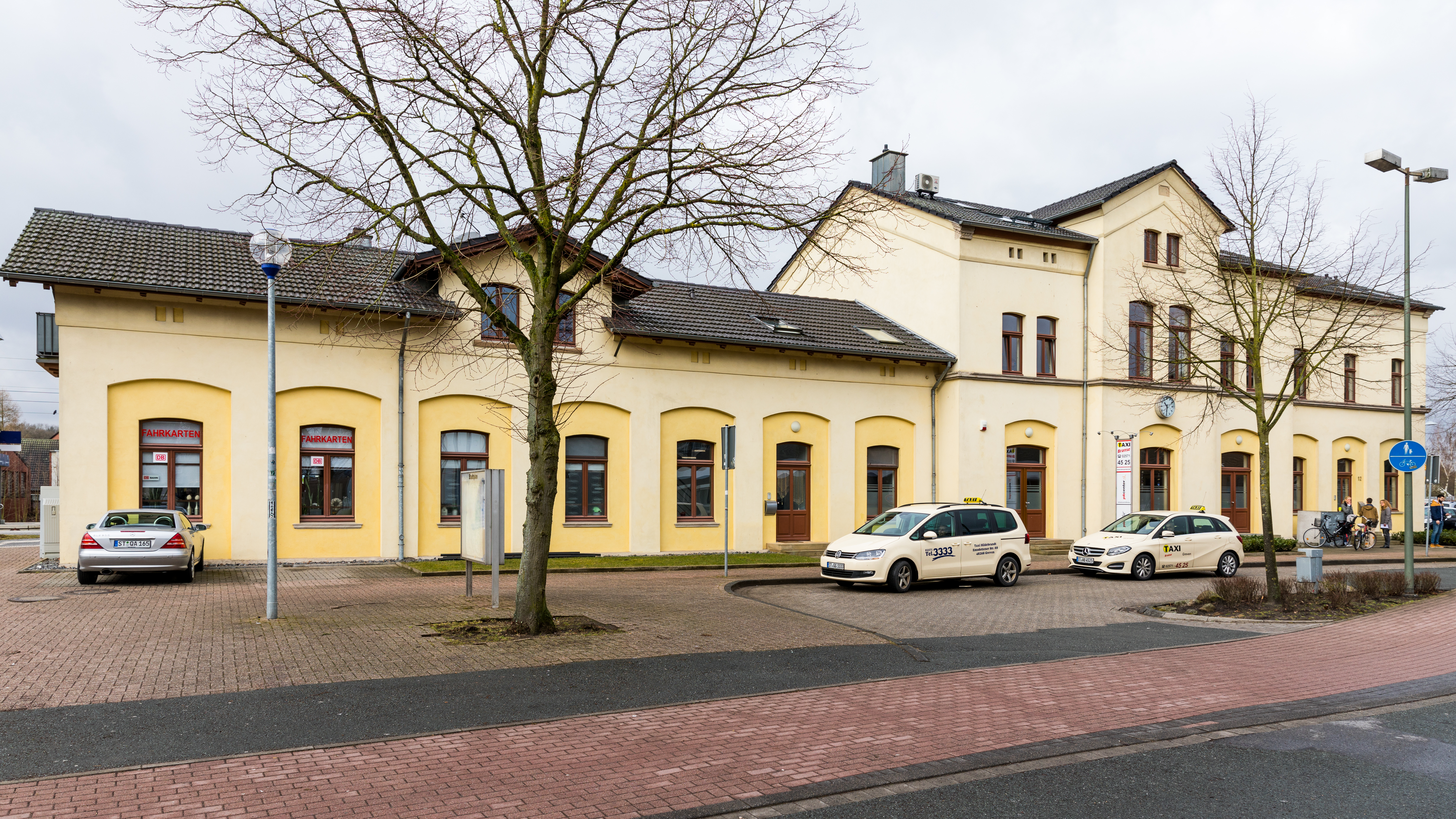 Bahnhof Greven, Straßenansicht